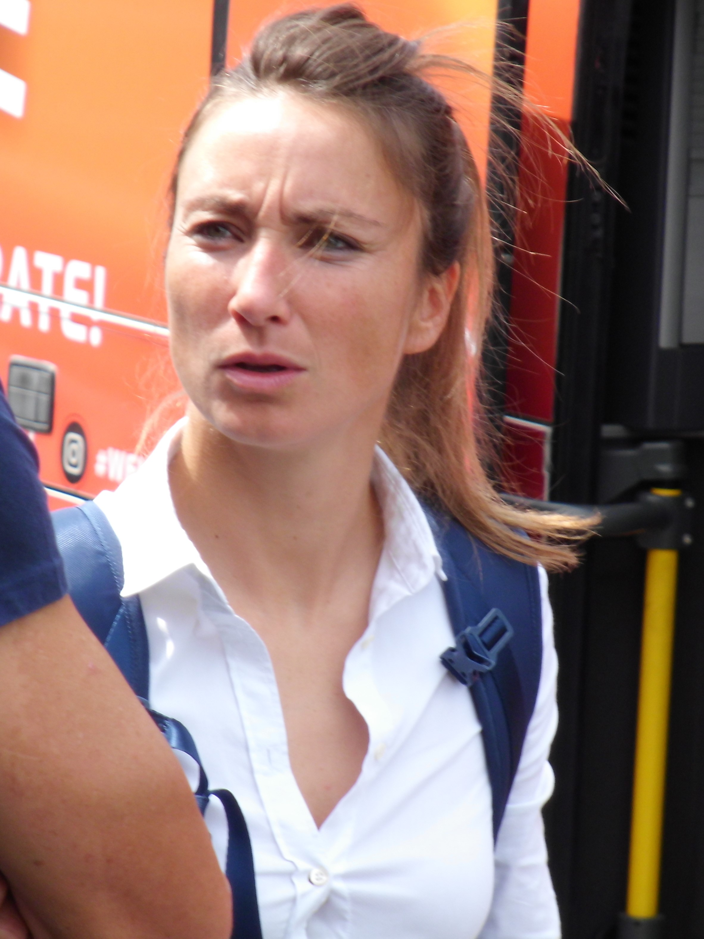 Gaëtane Thiney am Bus vor dem Hotel in Zwijndrecht nach dem Ausscheiden der Bleues bei der EM 2017.